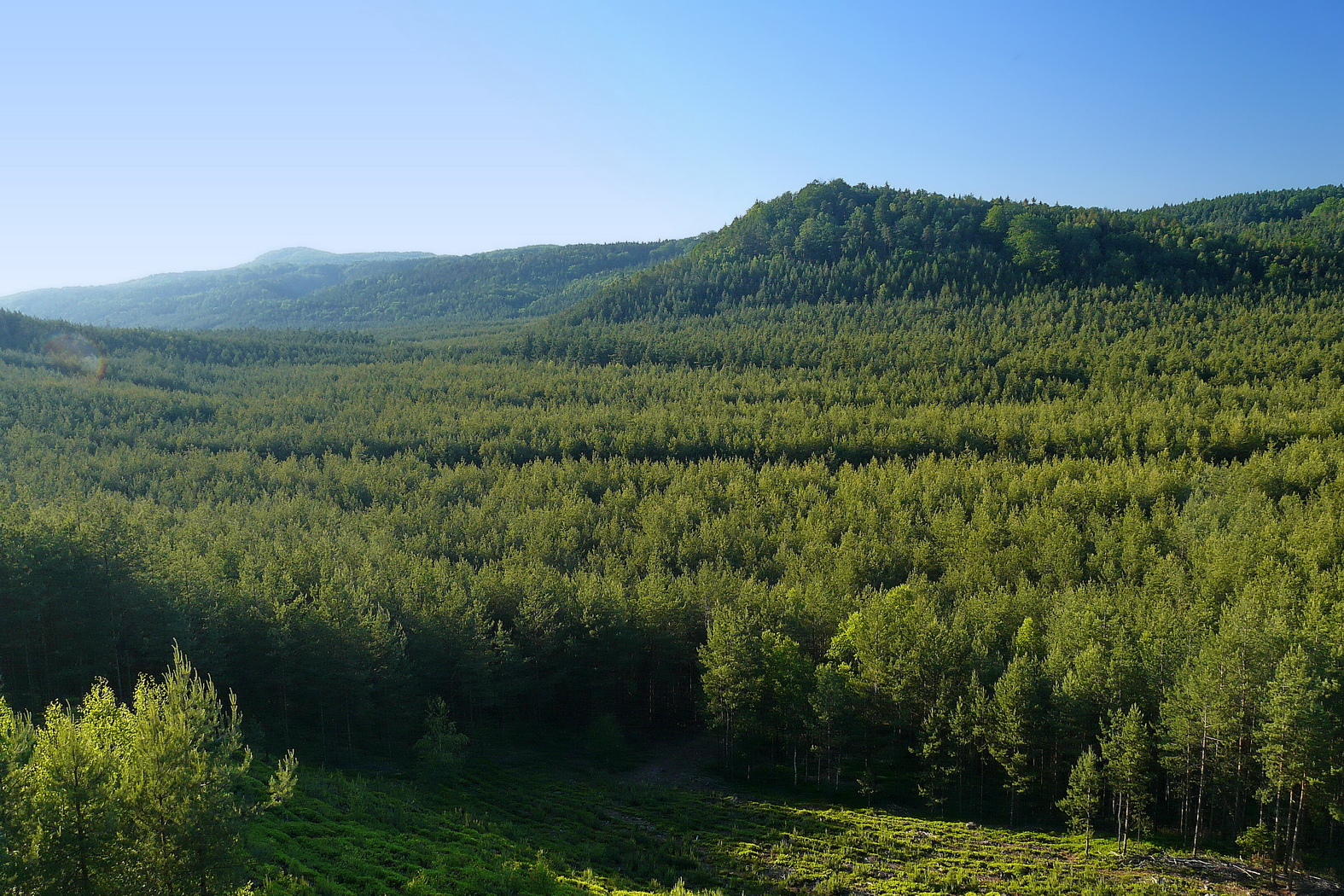 Malý Borný a Hradčanská pahorkatina z Havířského vrchu, vlevo vzadu vrch Dub